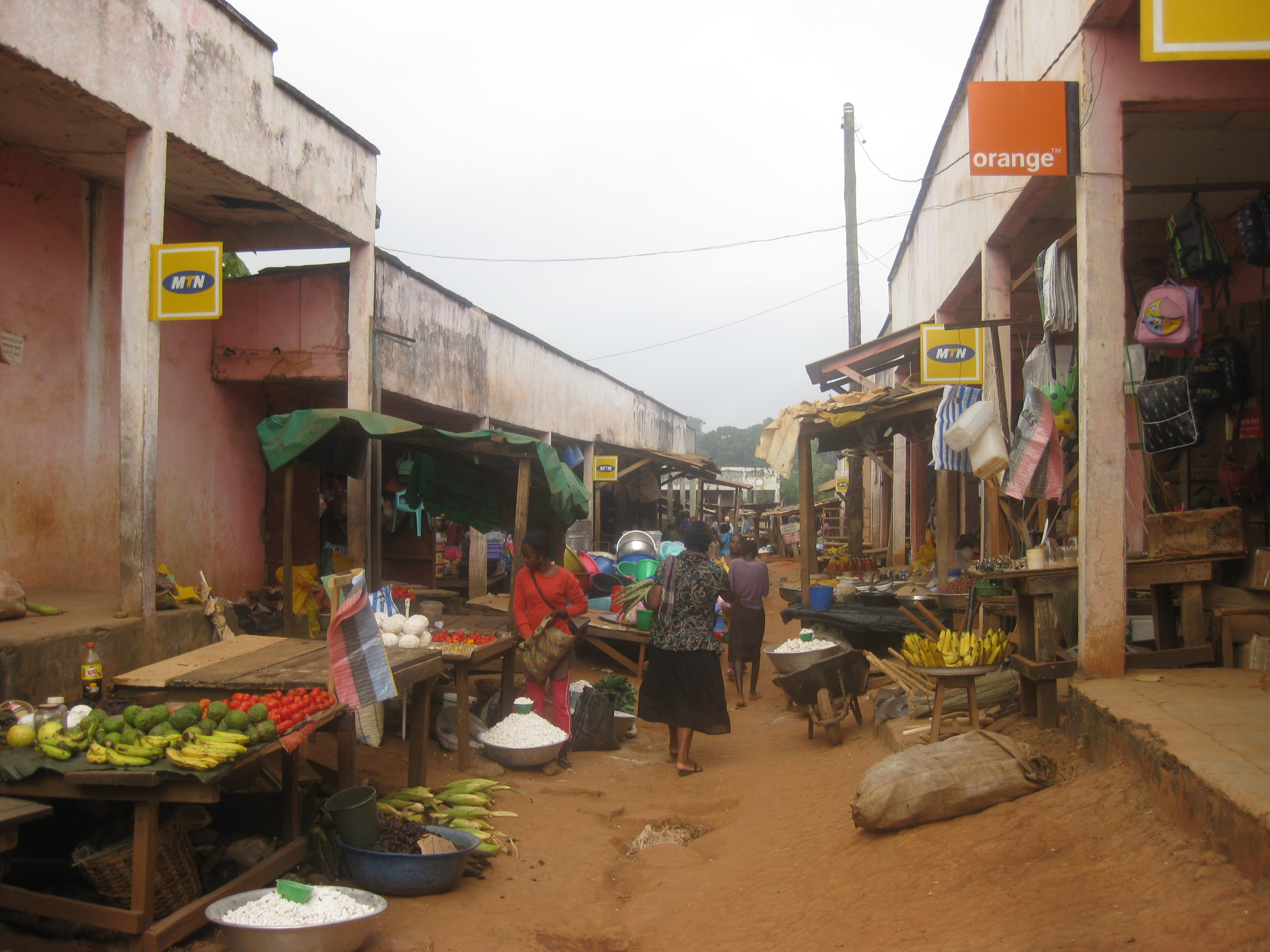 le marche ouvre tot. Apres l'affluence matinale, il se vide et tourney au ralenti jusqu'au soir, ou l'on ne trouve plus que les boutiques ouvertes et pas les vivres fraiches...